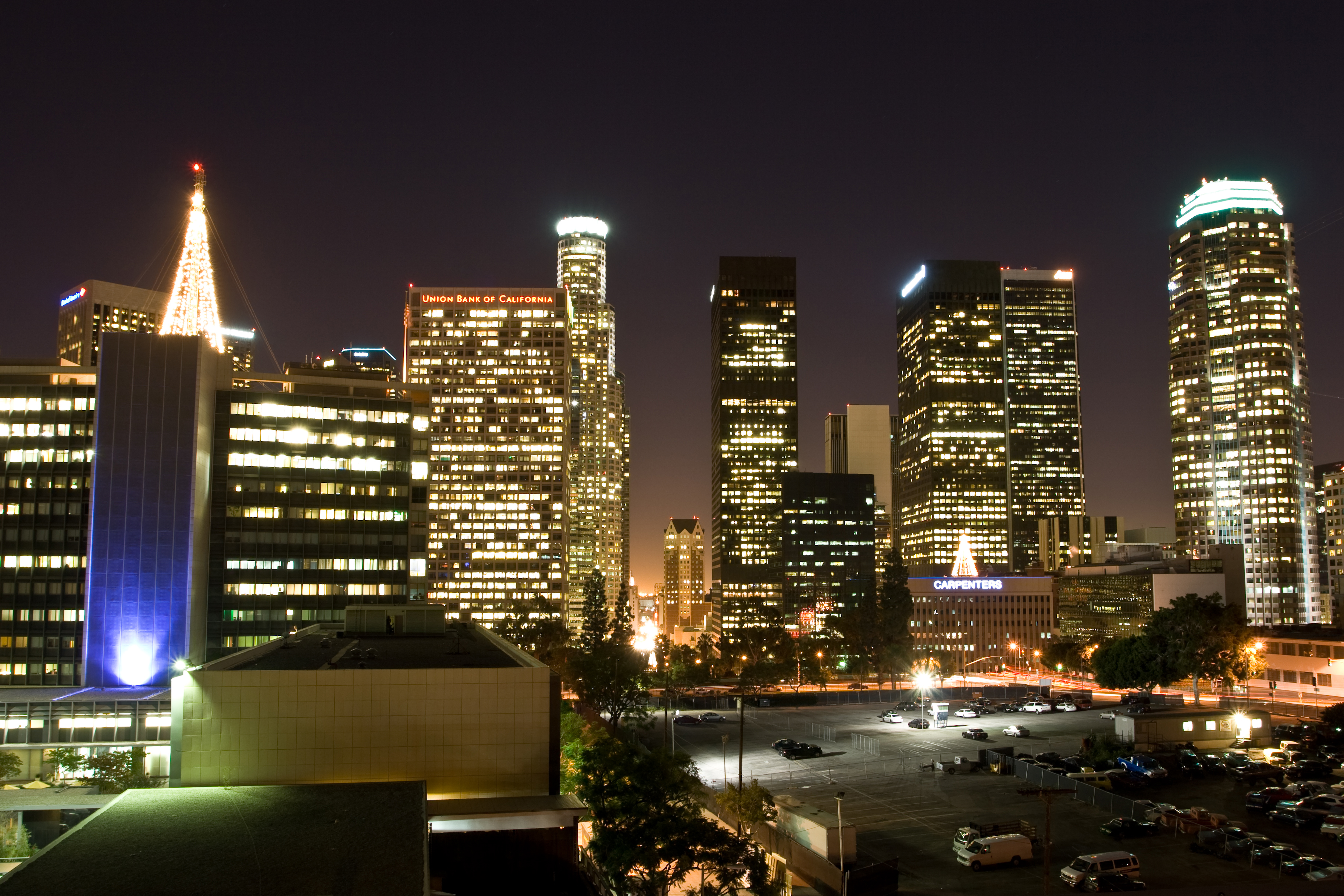 Los Angeles